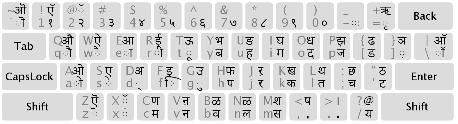 Devanagari INSCRIPT keyboard layout